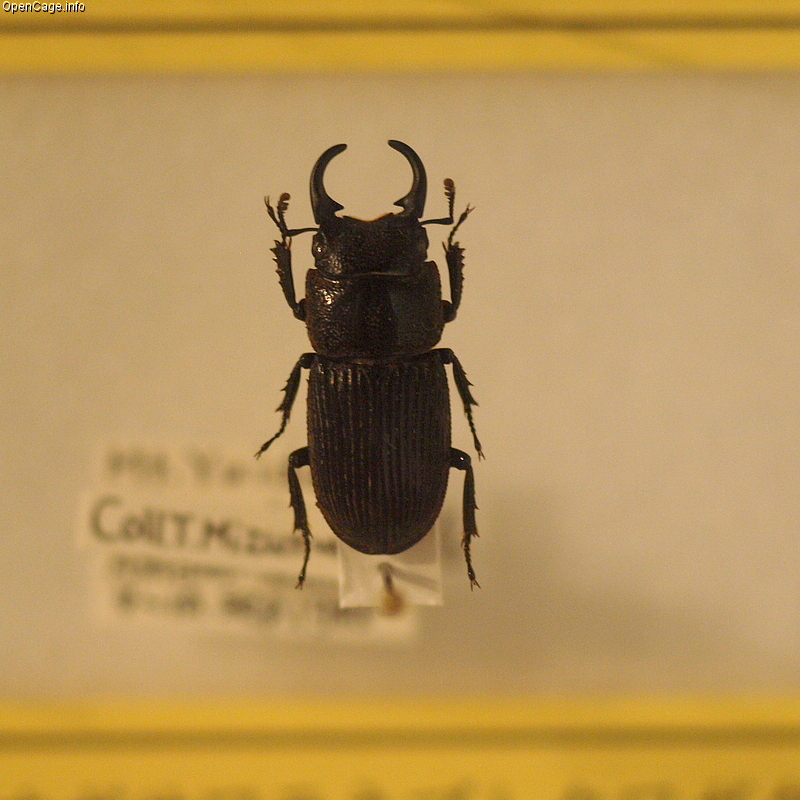 Amami-nebuto-kuwagata アマミネブトクワガタ 奄美根太鍬形虫 Aegus laevicollis taurulus . 姫路科学館にて。